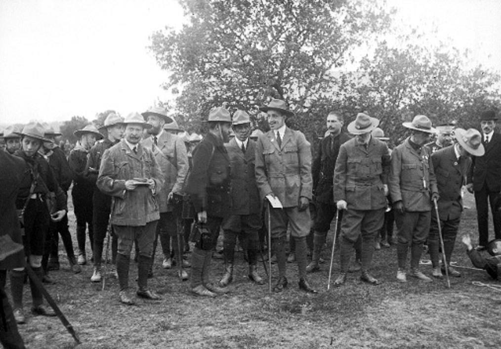 Foto de los Exploradores de España (boy scouts españoles) donde aparece José Antonio Primo de Rivera a la izquierda y el rey Alfonso XIII (c. 1918)